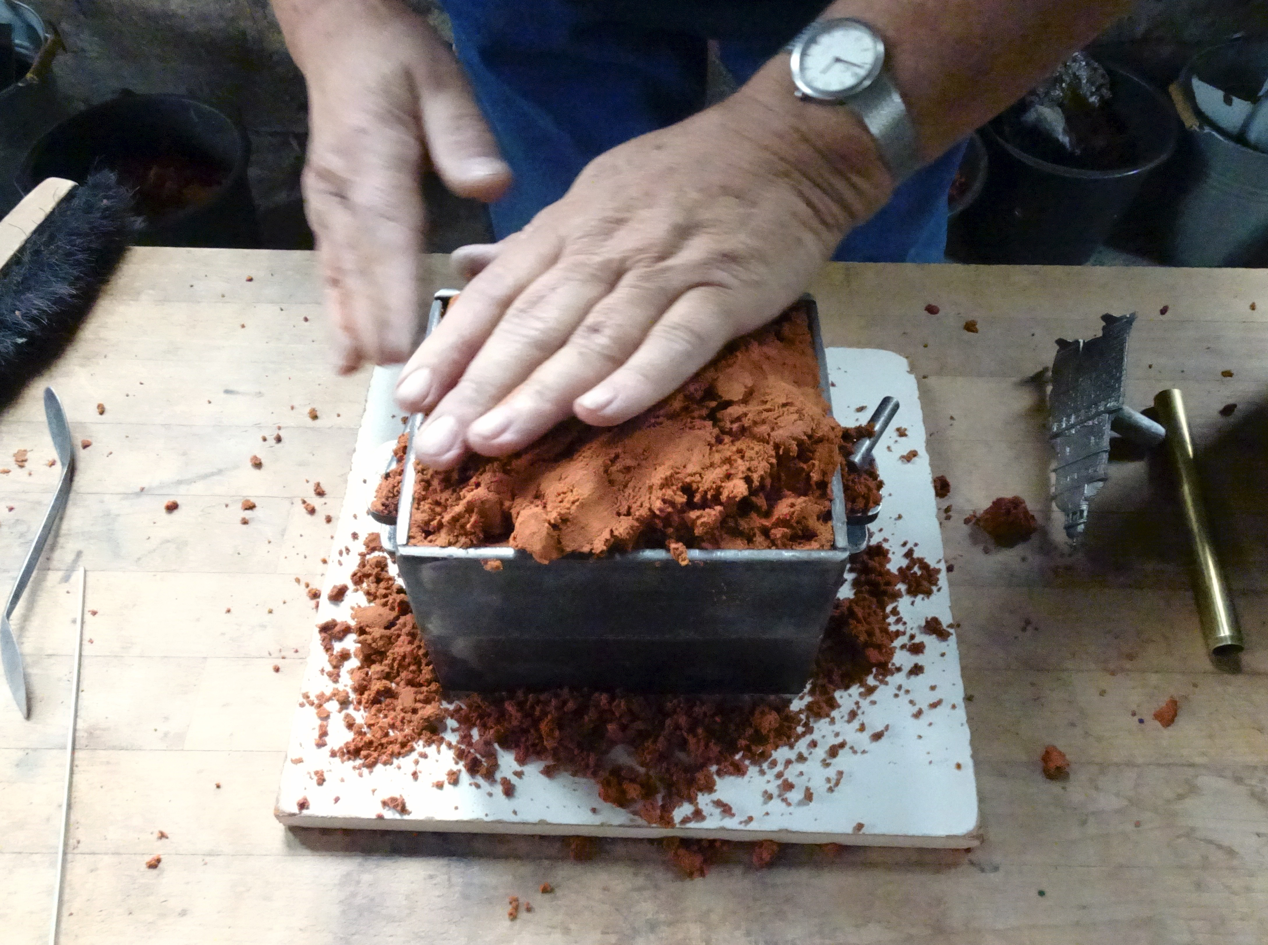 Alte Metallgiesserei Kiel, Vorführung für einen Guss